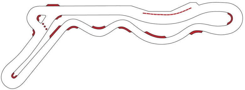 コース図。2017年6月制作。